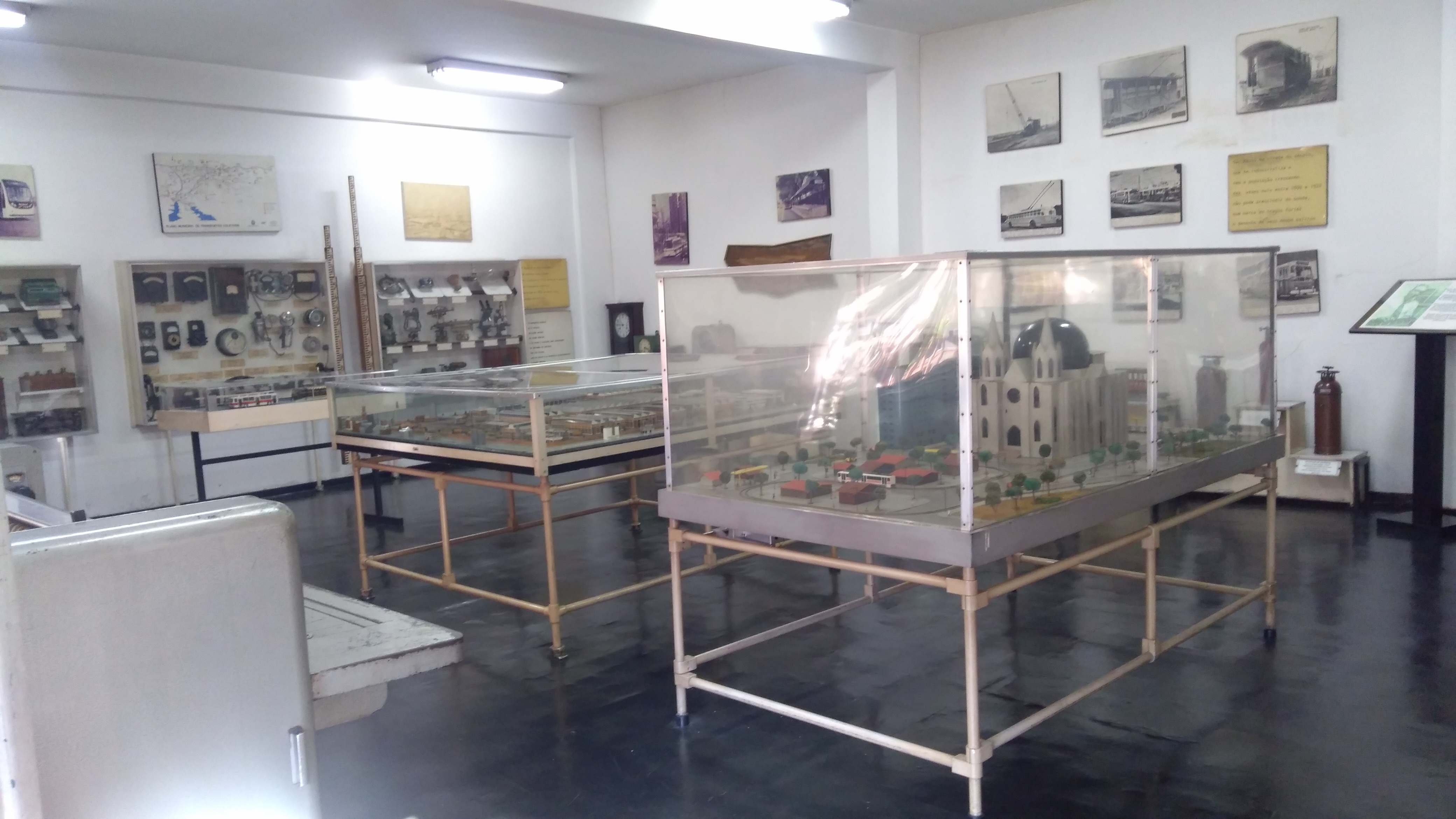 Sala de instrumentos e documentos do museu. Na imagem há quadros de transportes na parede e maquetes e instrumentos protegidos.